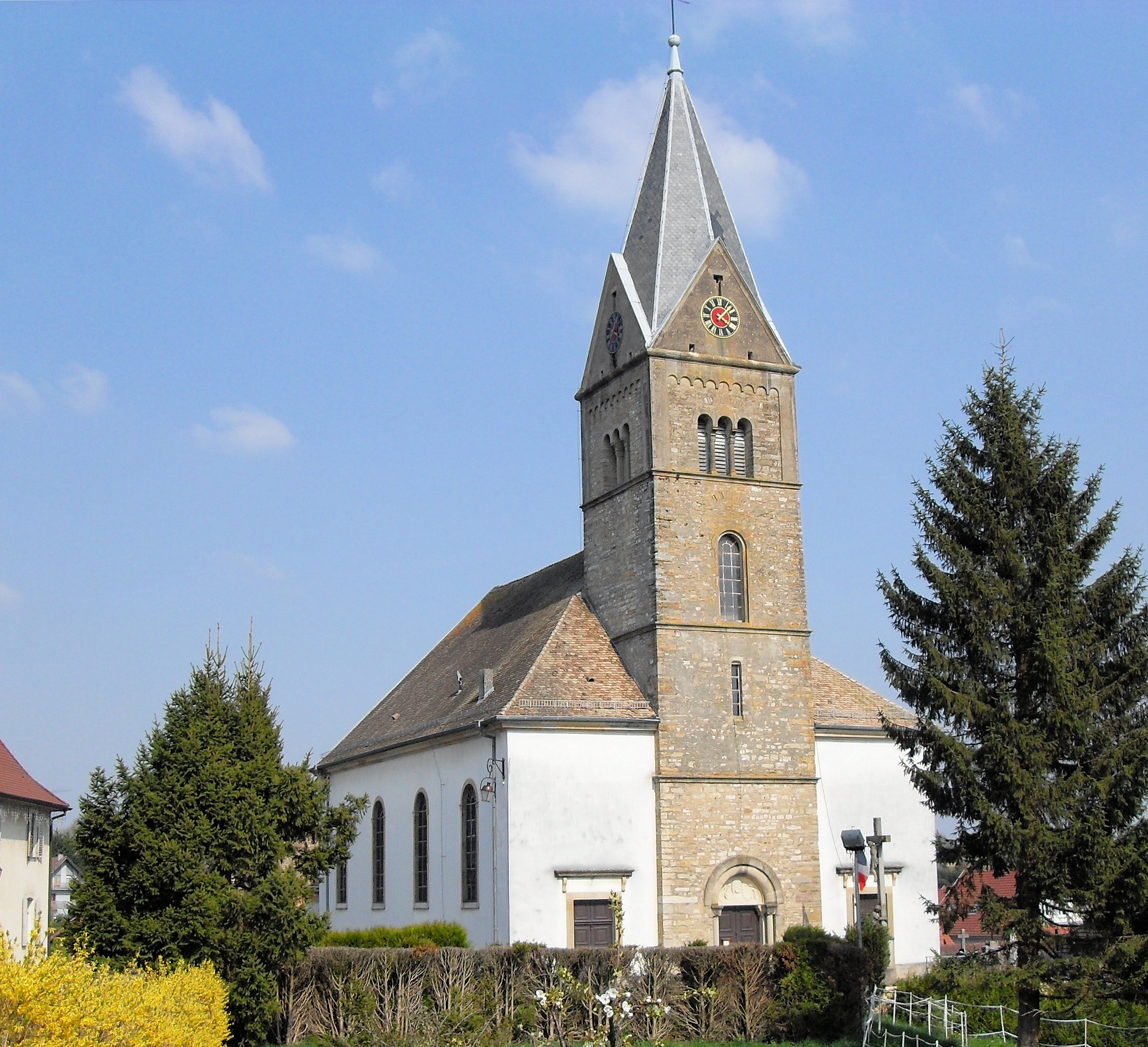 L'église Saint-Georges à Rantzwiller